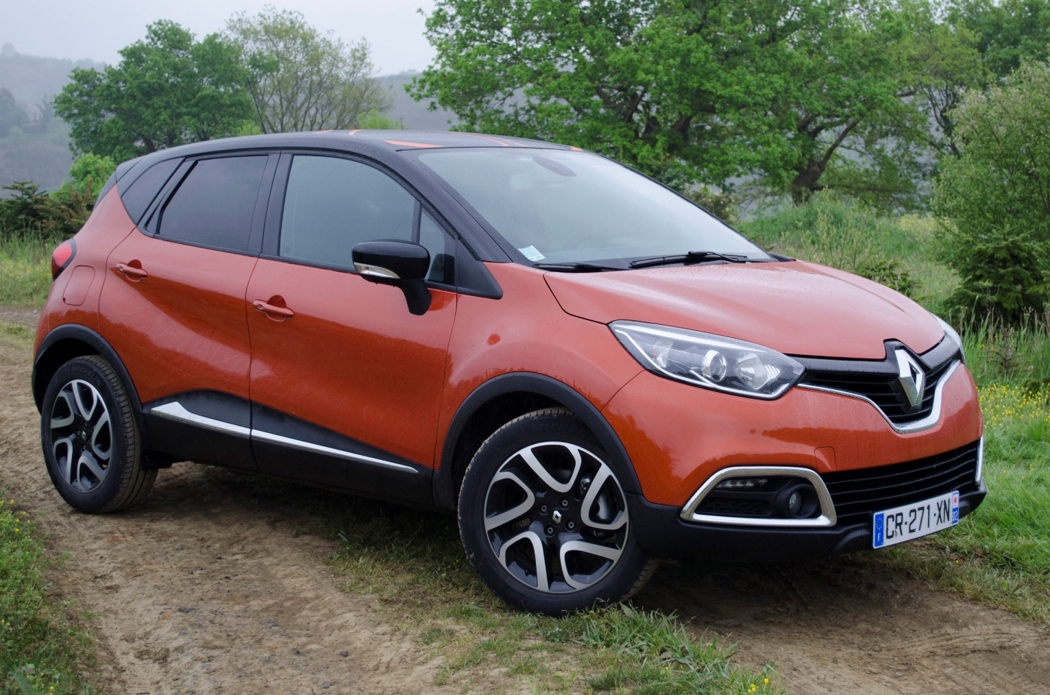 Egy Renault Captur földúton.